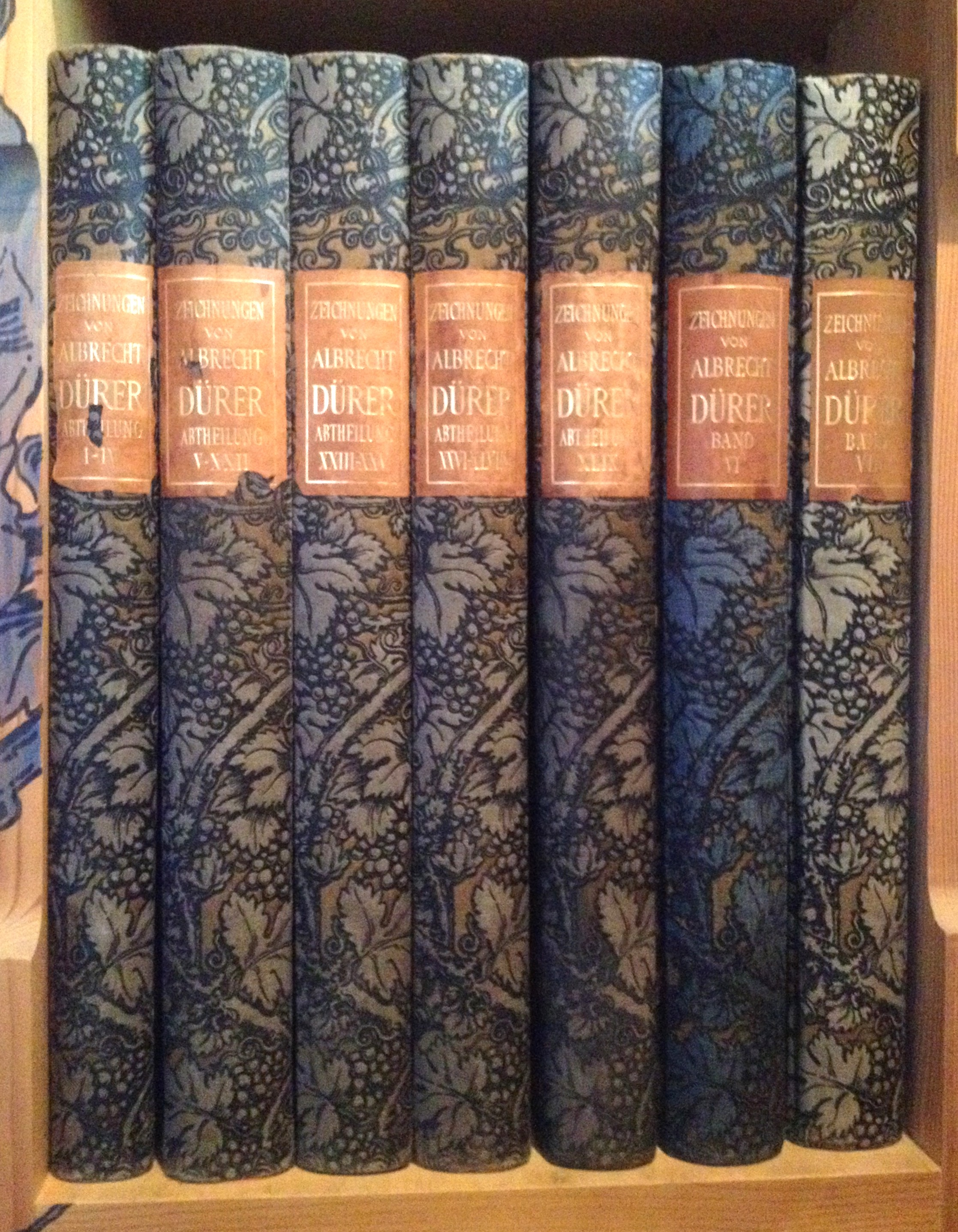 Fotogtaphie der Bände 1-7, "Zeichnungen von Albrecht Dürer", herausgegeben von Friedrich Lippmann, Berlin 1883